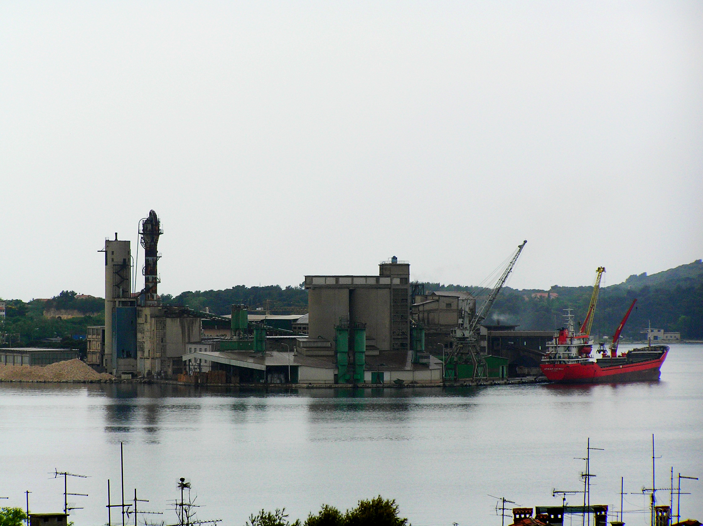 Tvornica cementa u Puli